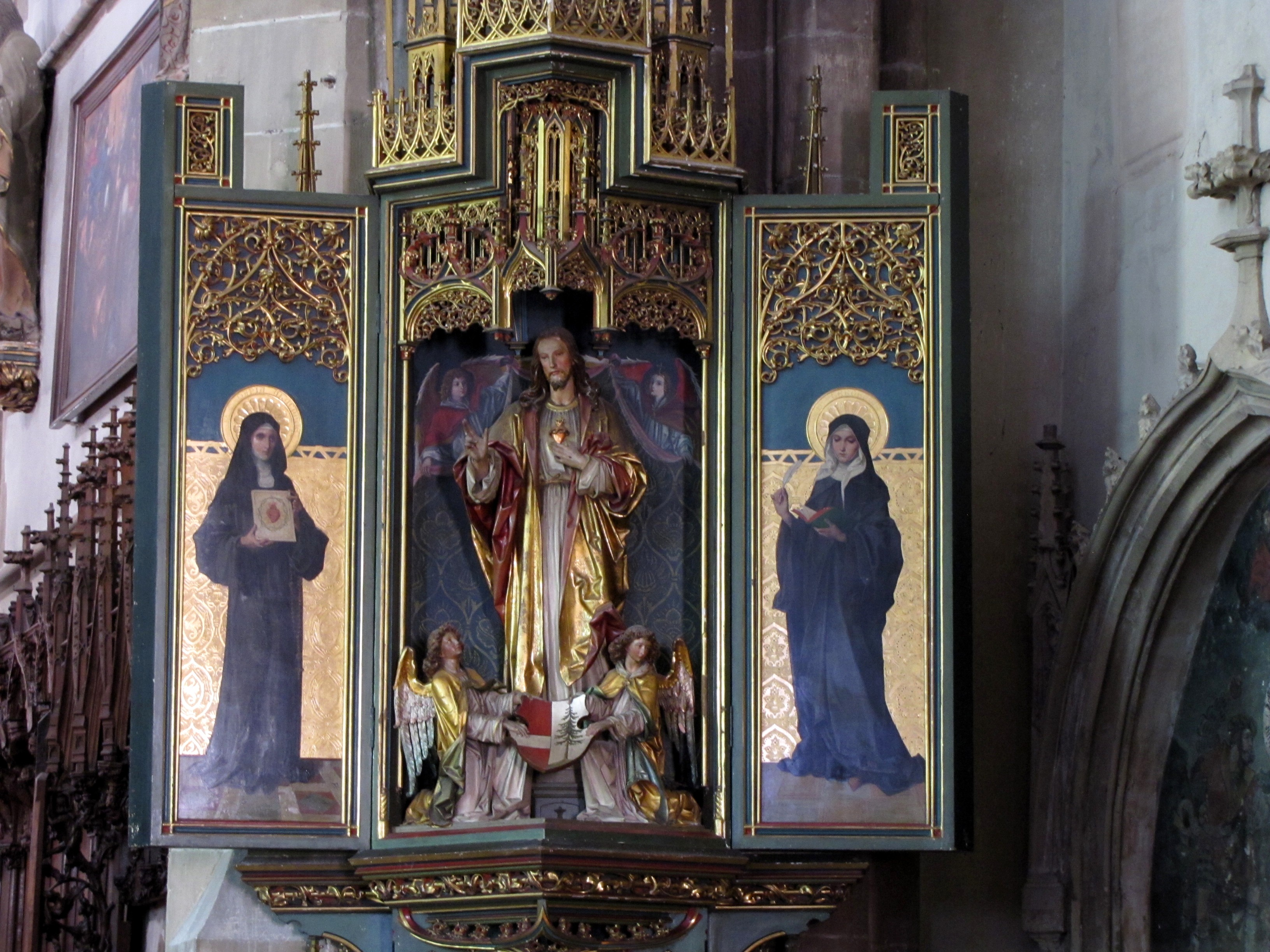 Alsace, Haut-Rhin, Collégiale Saint-Thiébaut de Thann (PA00085696, IA00024314). Autel-retable du Sacré-Cœur de Jésus (XIXe): This object is classé Monument Historique in the base Palissy, database of the French furniture patrimony of the French ministry of culture, under the references PM68000383 and IM68000745.